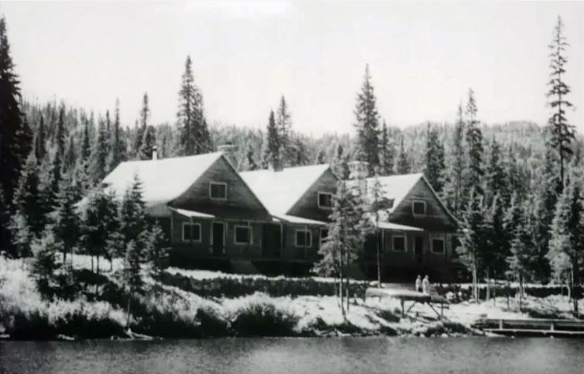 Chalet des Portes-de-l'Enfer, rivière Pikauba, parc national des Laurentides, Québec